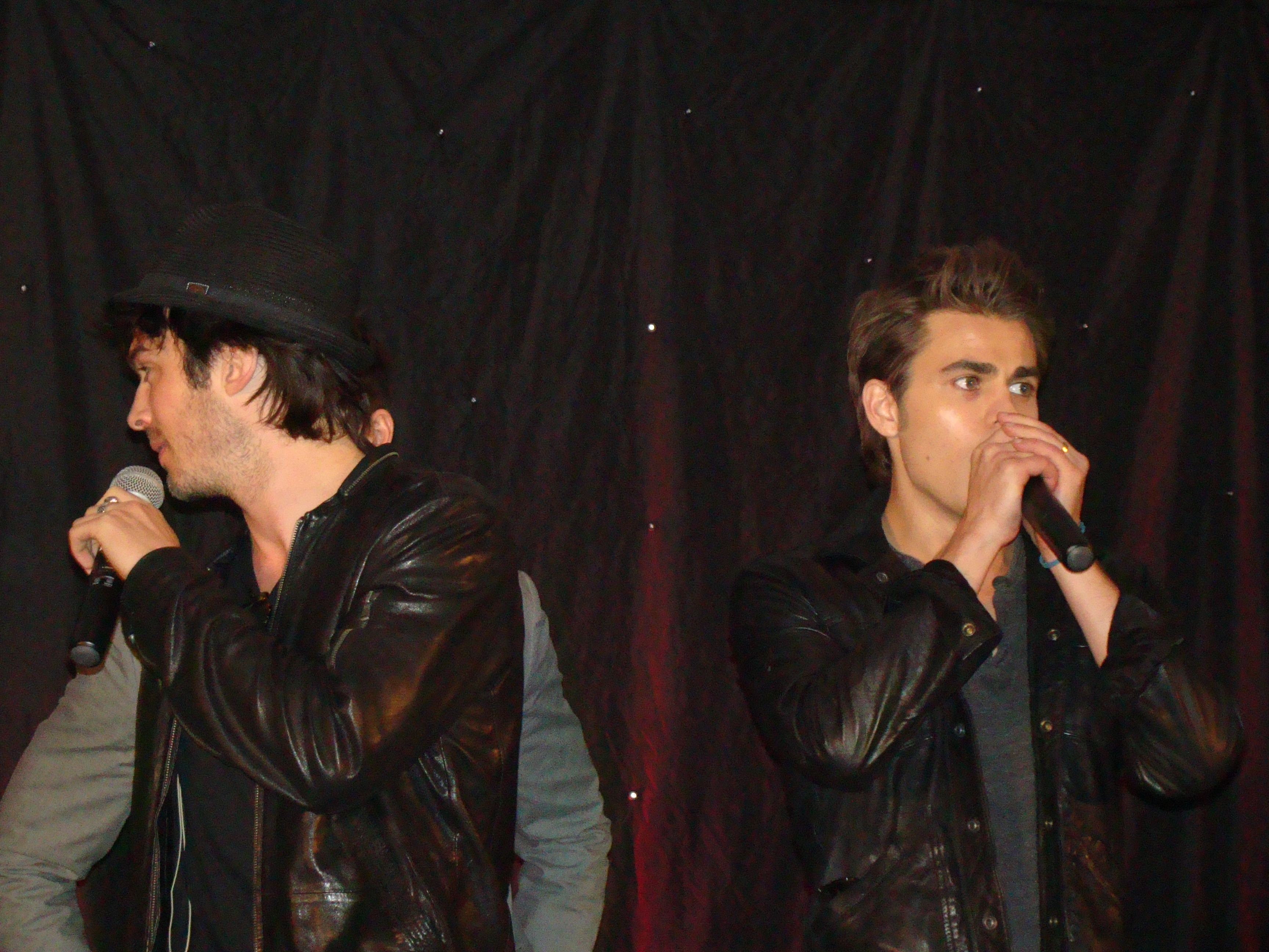 Ian Somerhalder & Paul Wesley